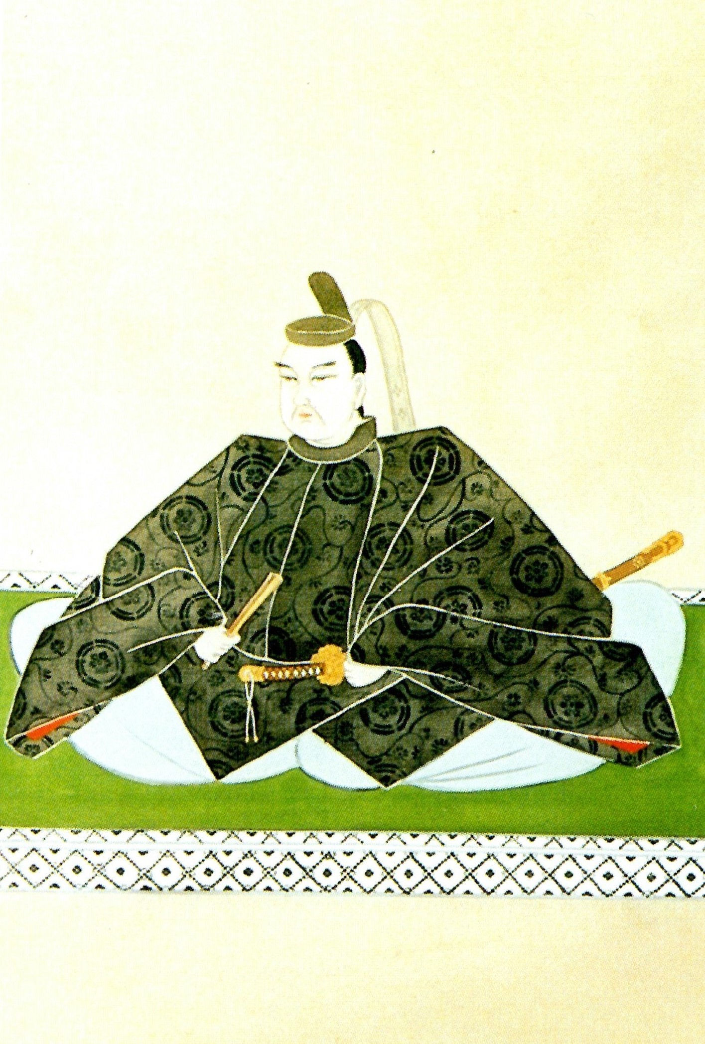 戸田氏信の肖像。